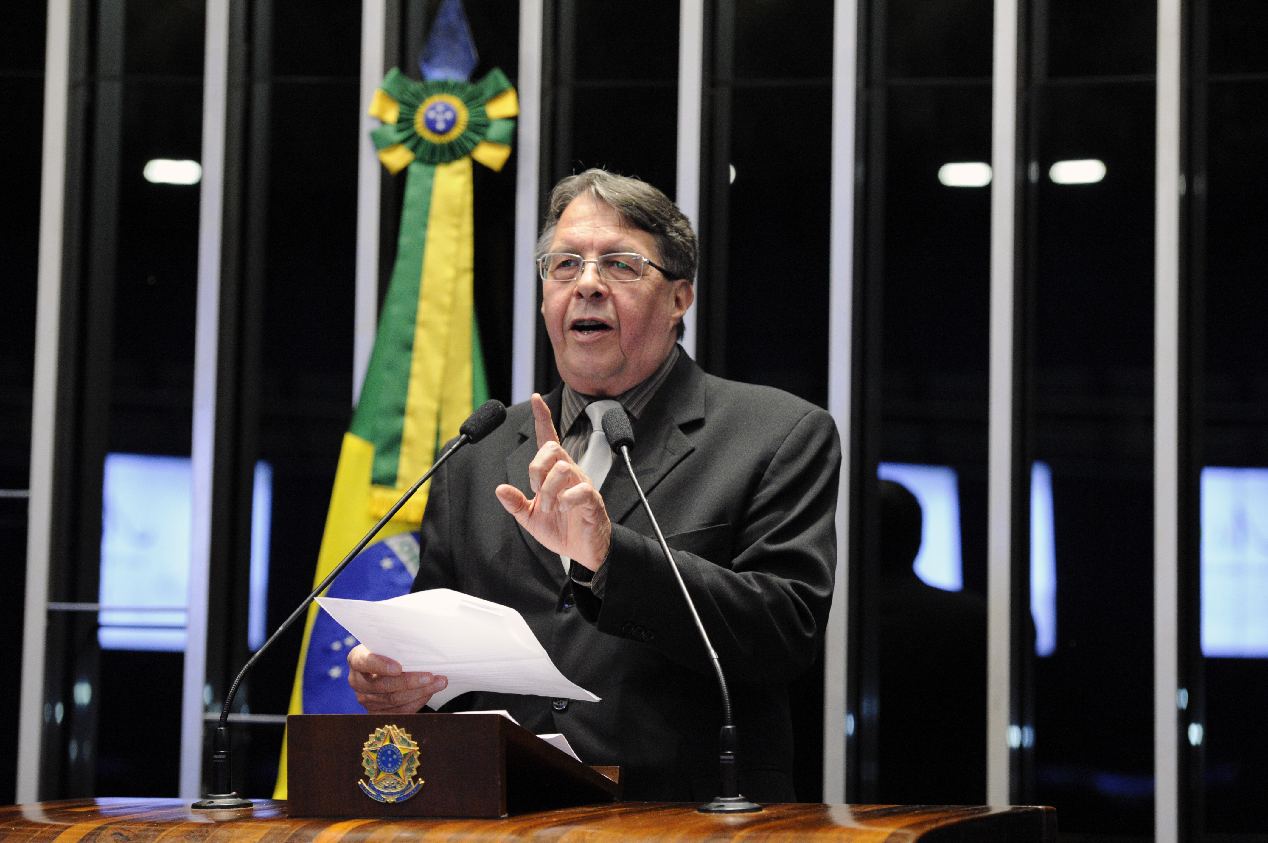 SessÃ£o especial destinada a comemorar os 40 anos da AssociaÃ§Ã£o Nacional dos Magistrados da JustiÃ§a do Trabalho (Anamatra). Em discurso, o presidente da AssociaÃ§Ã£o Nacional dos Auditores Fiscais da Receita Federal do Brasil (Anfip), Vilson Antonio Romero. Foto: Edilson Rodrigues/AgÃªncia Senado